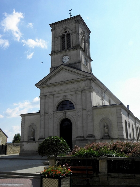 Église Notre-Dame-de-l'Assomption du Mêle-sur-Sarthe (61).